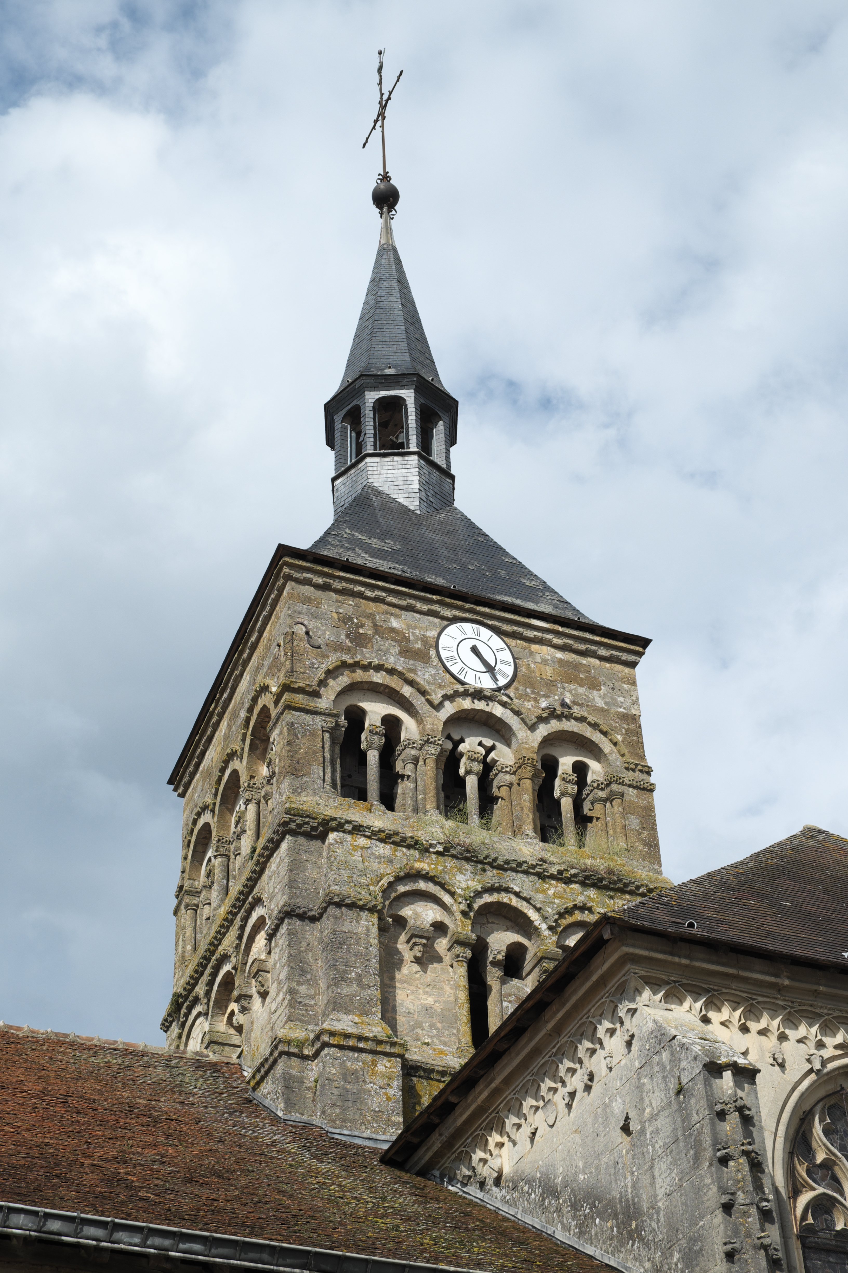 Katholische Kirche Saint-Remi in Ceffonds im Département Haute-Marne (Champagne-Ardenne/Frankreich), romanischer Glockenturm .